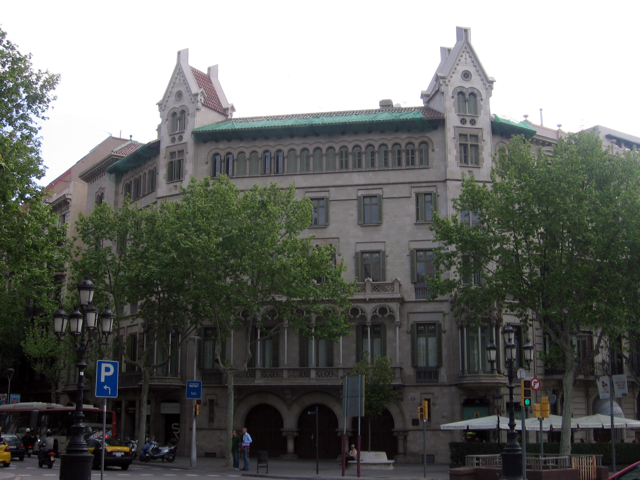 Casa Viuda Marfà (1901-1905), de Manuel Comas i Thos.